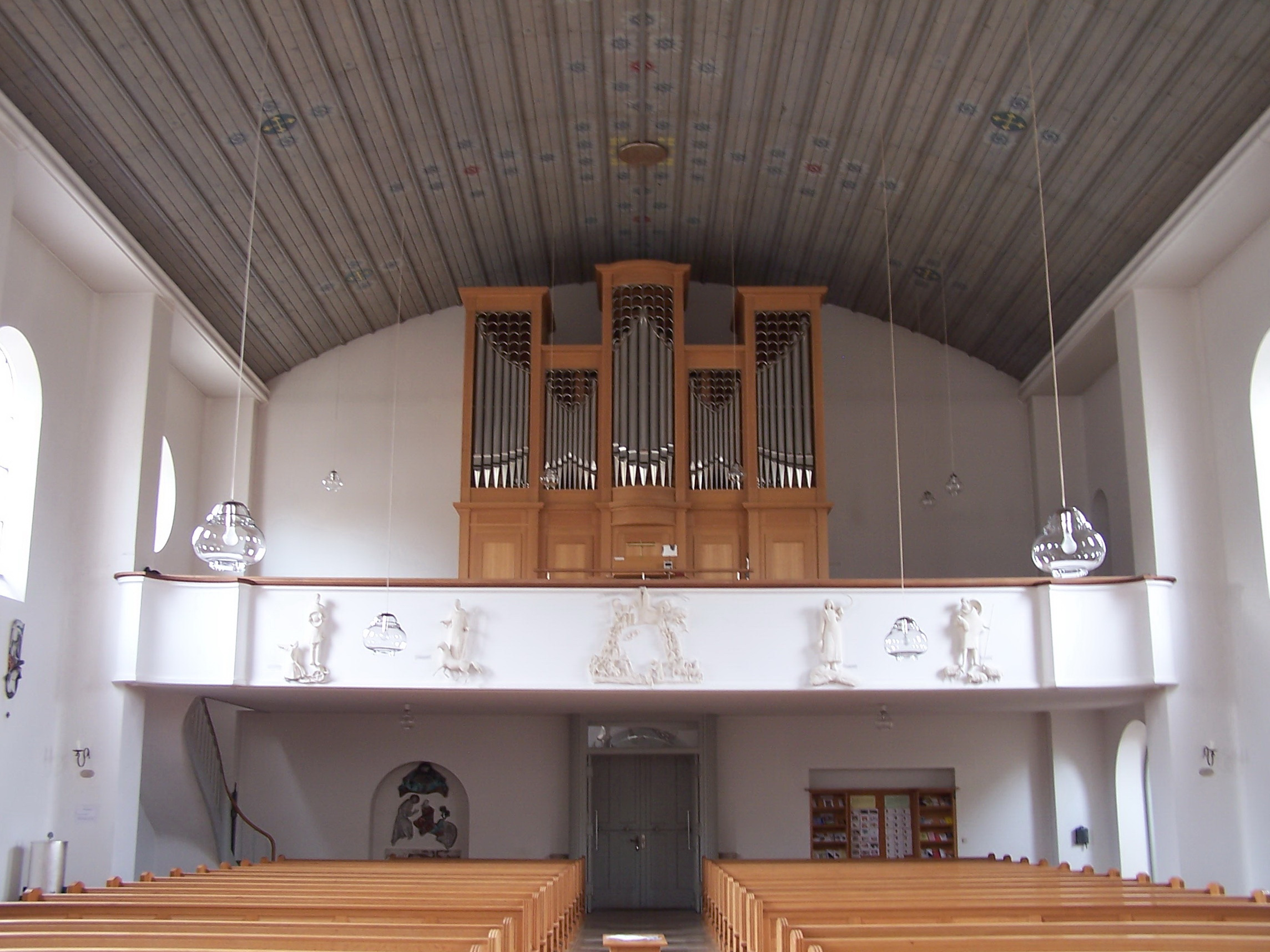 Mamming, Hauptstraße 26. Katholische Pfarrkirche St. Margareta. Die gotische Kirche aus dem 15. Jahrhundert wurde in den letzten Kriegstagen 1945 zerstört. Die heutige Kirche wurde 1947/49 nach Plänen von Friedrich Haindl, München neu erbaut. Das Langhaus mit Blick auf die Westempore mit der großen Sandtner Orgel mit 22 Registern.